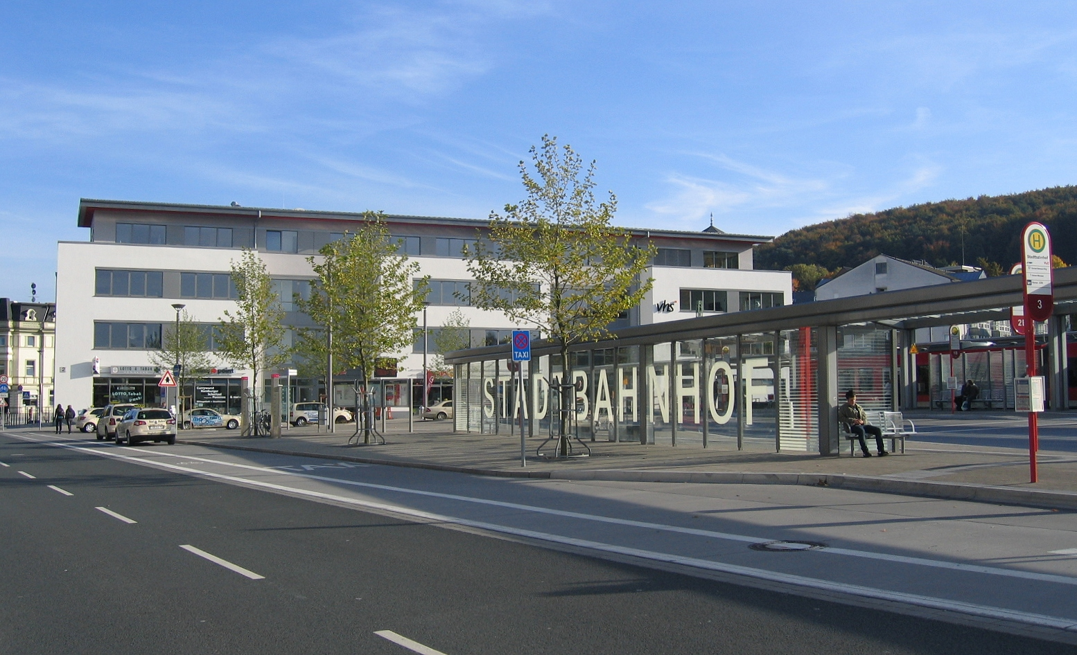 Stadtbahnhof Iserlohn (Neubau, ehemals "Westbahnhof")